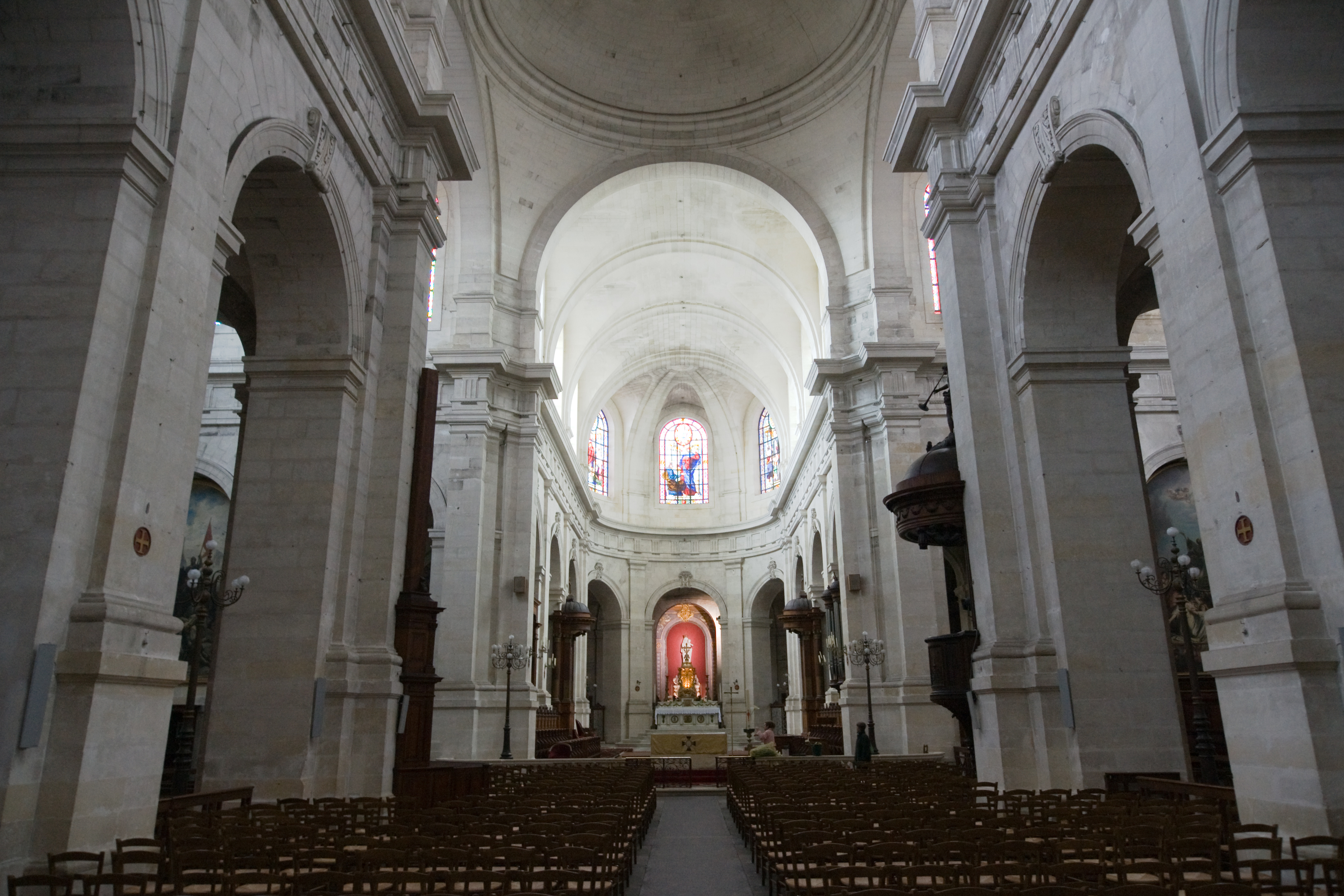 La Rochelle - Cathédrale St Louis, Intérieur